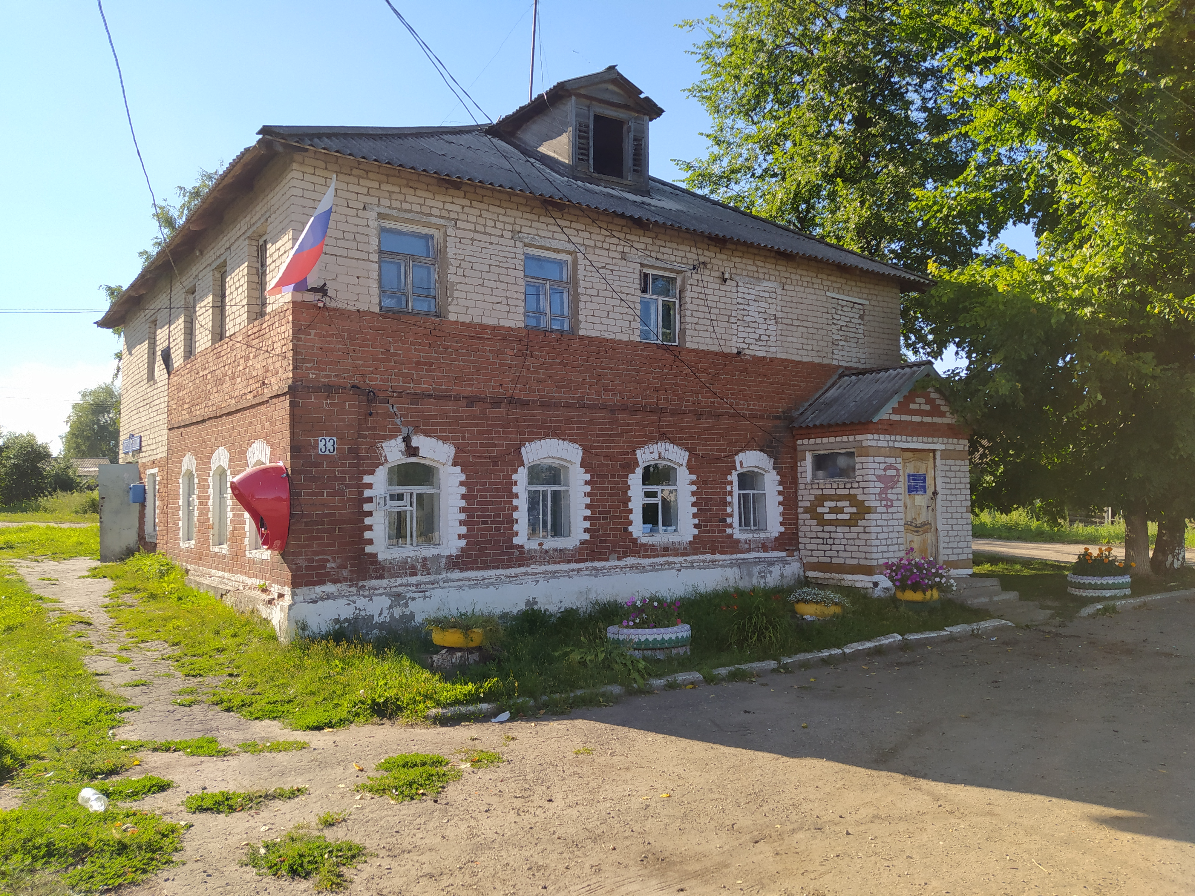 Дом в д. Большая Свеча